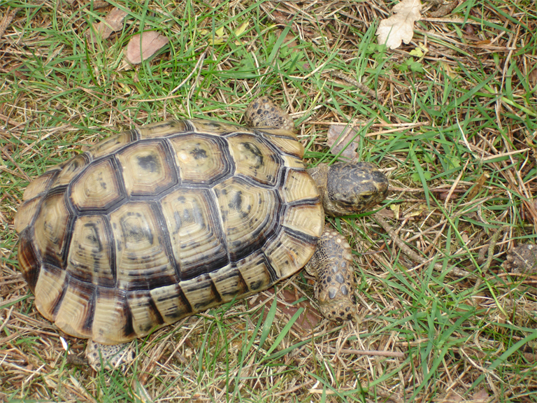 Testudo